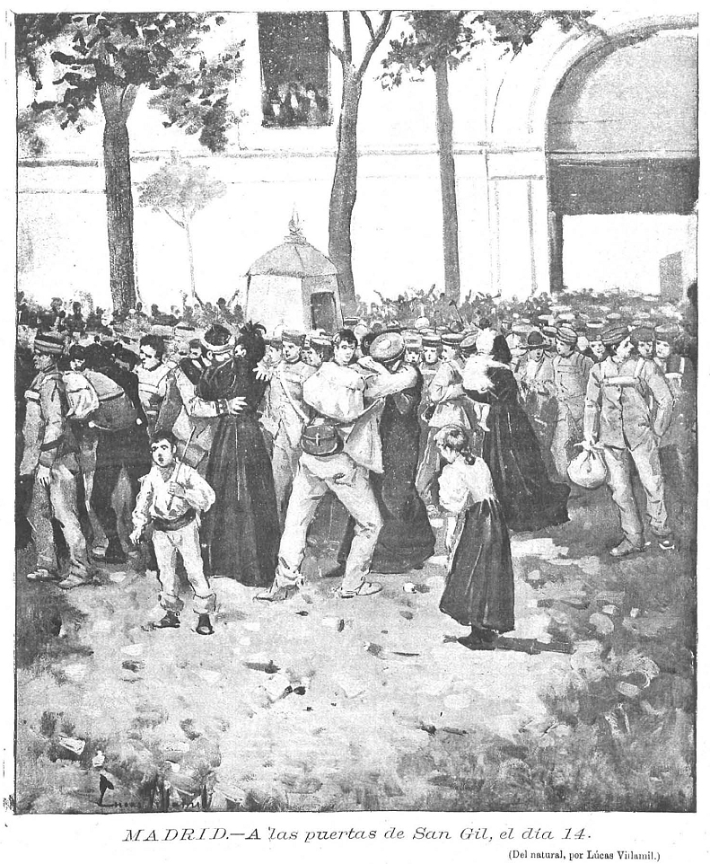 Tropas a Cuba, Madrid, a las puertas de San Gil, el día 14 de agosto de 1895, en la revista española Nuevo Mundo.